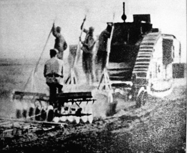 Пахотные работы на танке Mark V. 1920-e. Иллюстрация из книги Жуков Г К. Воспоминания и размышления. 1969. Раздел Гражданская война.